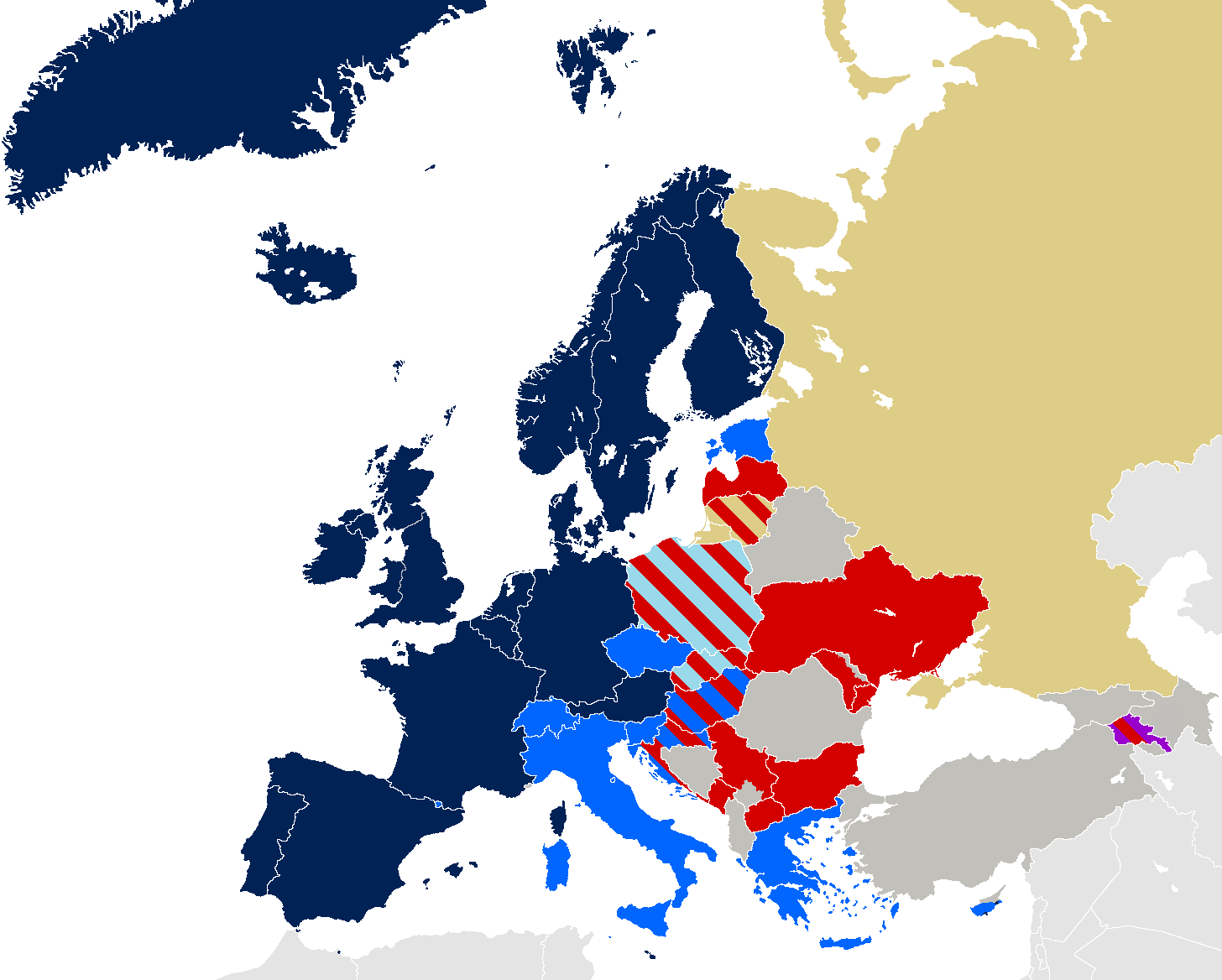 Situación del matrimonio homosexual y otros tipos de uniones homosexuales en Europa. Matrimonio Uniones civiles Registro cohabitacional Reconocimiento de matrimonios realizados en otros países Sin uniones civiles Matrimonio prohibido constitucionalmente Restricciones a la libertad de expresión y asociación Sin reconocimiento y prohibición del matrimonio.